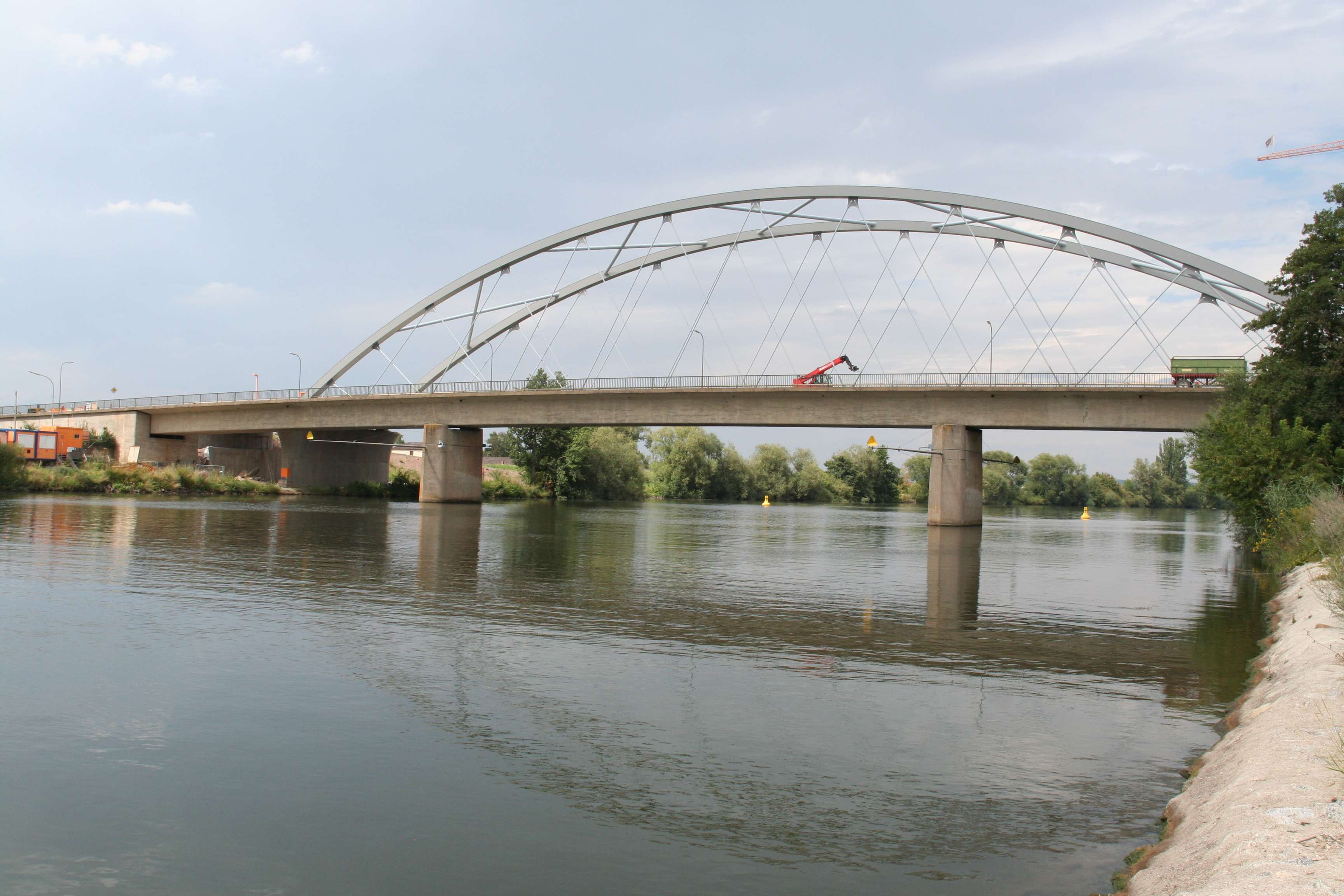 Mainbrücke Bergrheinfeld, Landkreis Schweinfurt, Unterfranken